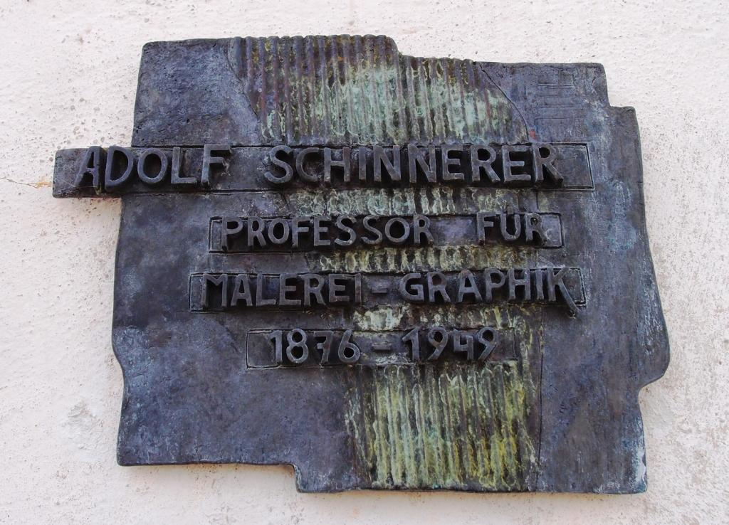 Erinnerung an Adolf Schinnerer, 1876-1949, Maler, Grafiker und Zeichner, Haimhausen, Kirche Ottershausen, Bayern